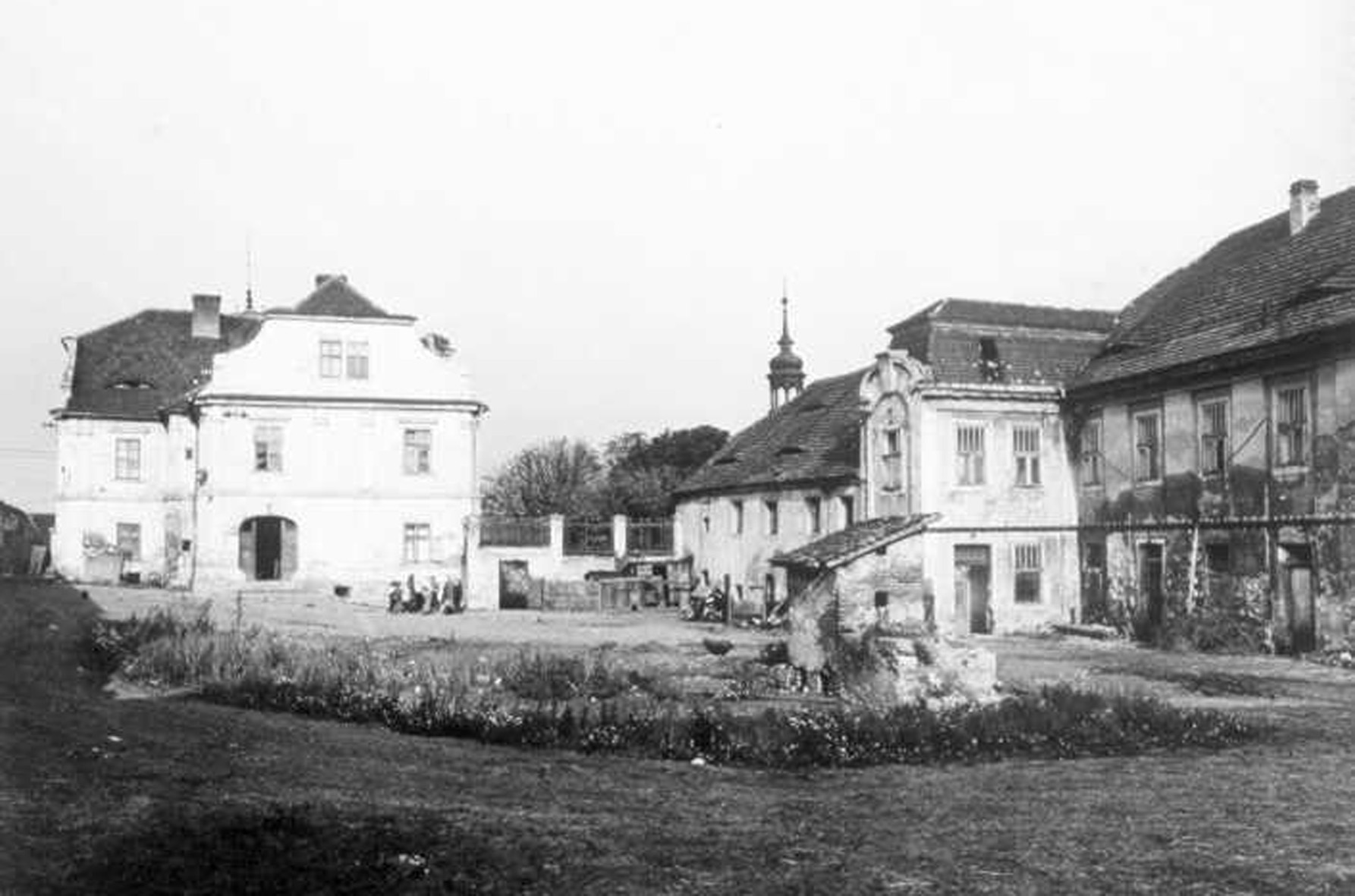 Ehemaliges Dorf Stránce (Stranitz) bei Most (Brüx) in Tschechien.